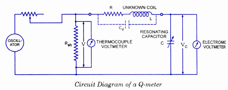 صورة لدائرة جهاز قياس معامل الجودة